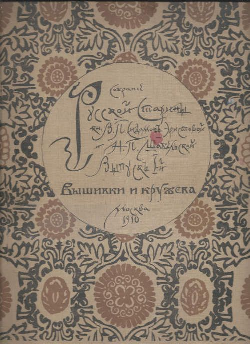 Собрание русской старины кн. В.П. Сидамон-Эристовой и Н.П. Шабельской. Выпуск 1-й. Вышивки и кружева